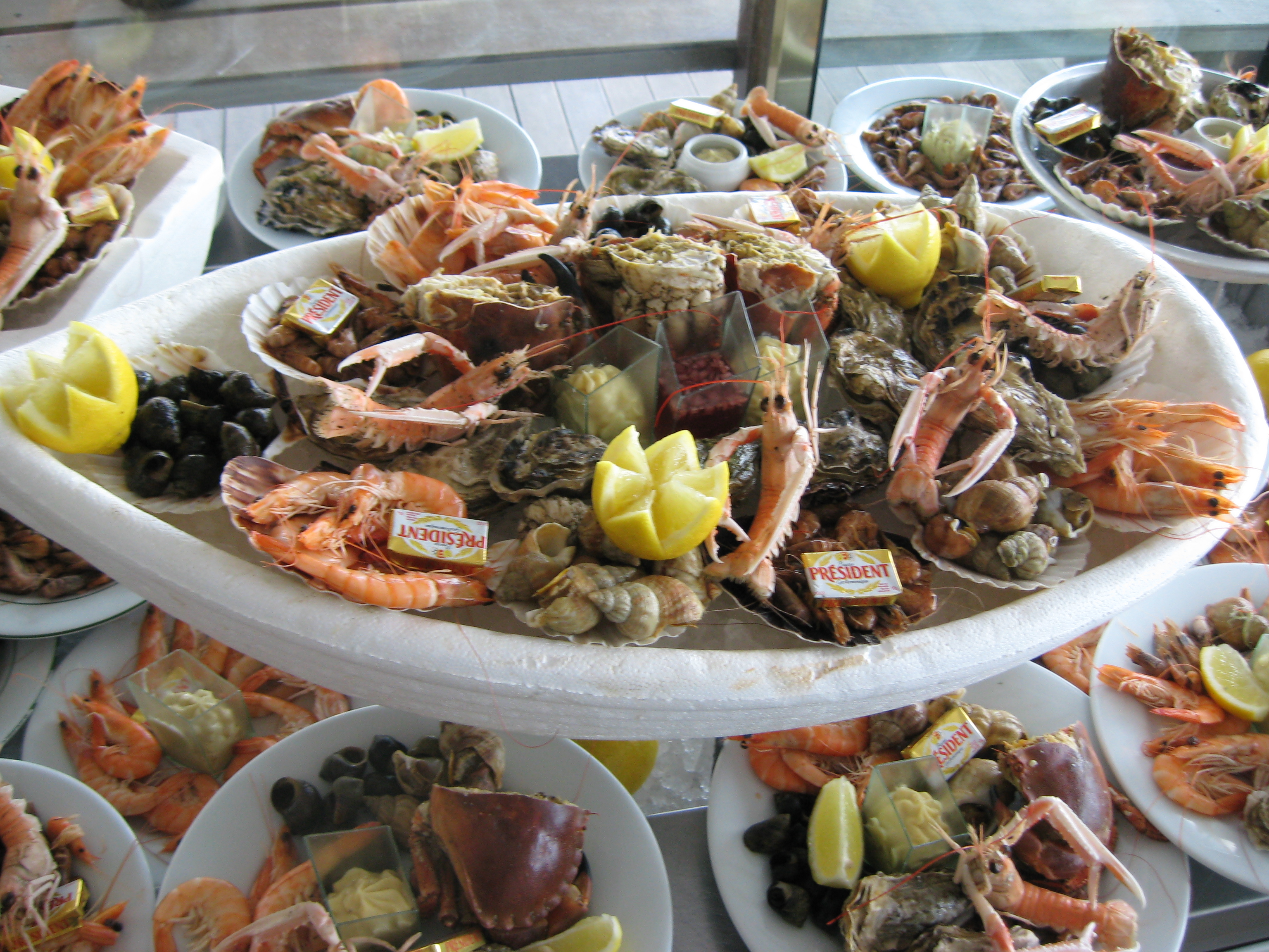 Früchte des Meeres (Foto erstellt in Etretat/Normandie) Datum: 23.05.2010 Urheber: Michael Pfeiffer Quelle: privates Bildarchiv des Urhebers